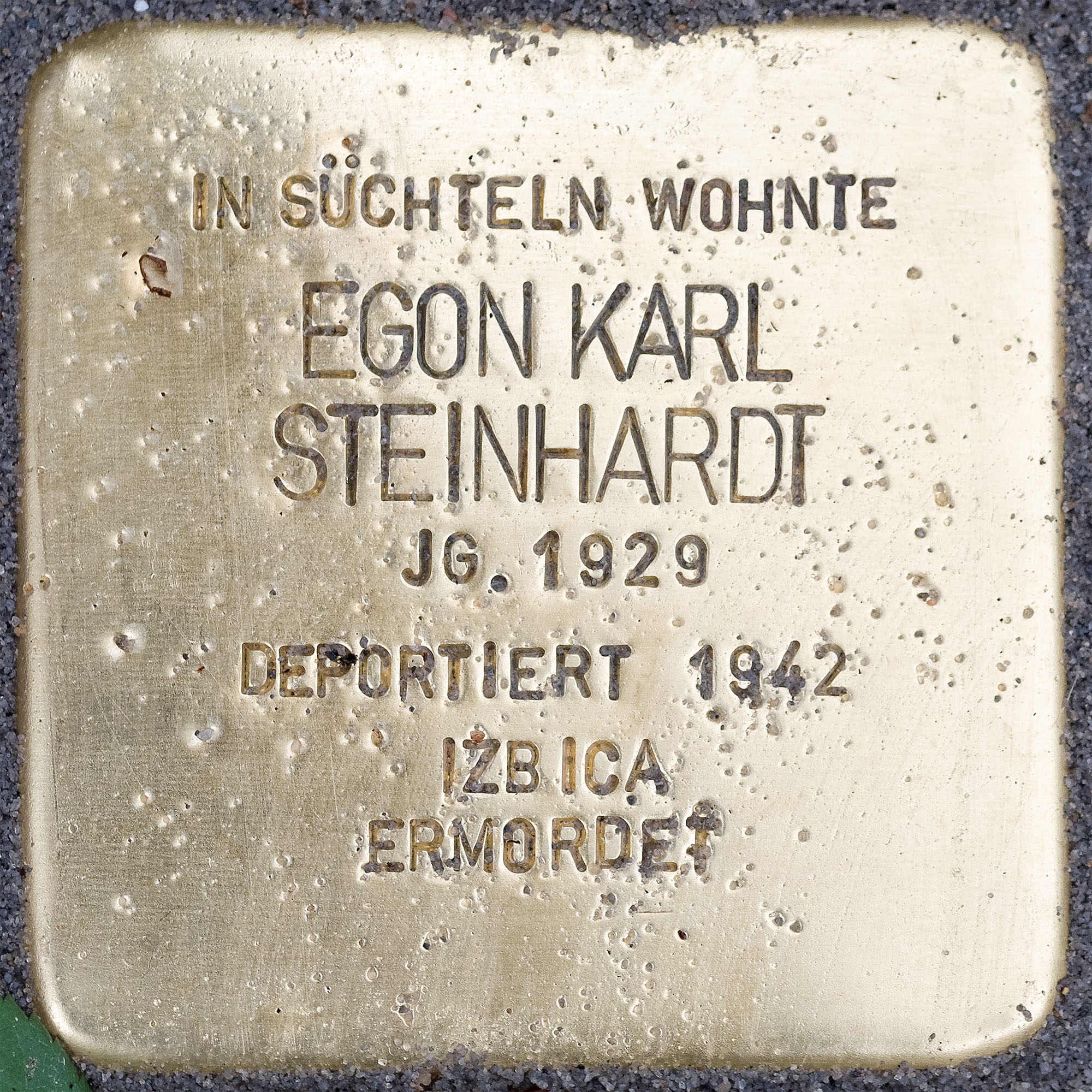 Stolpersteine Suechteln: Steinhardt, Egon Karl